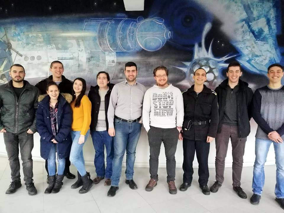 Студентско Космическо Общество Планетариум ВВМУ